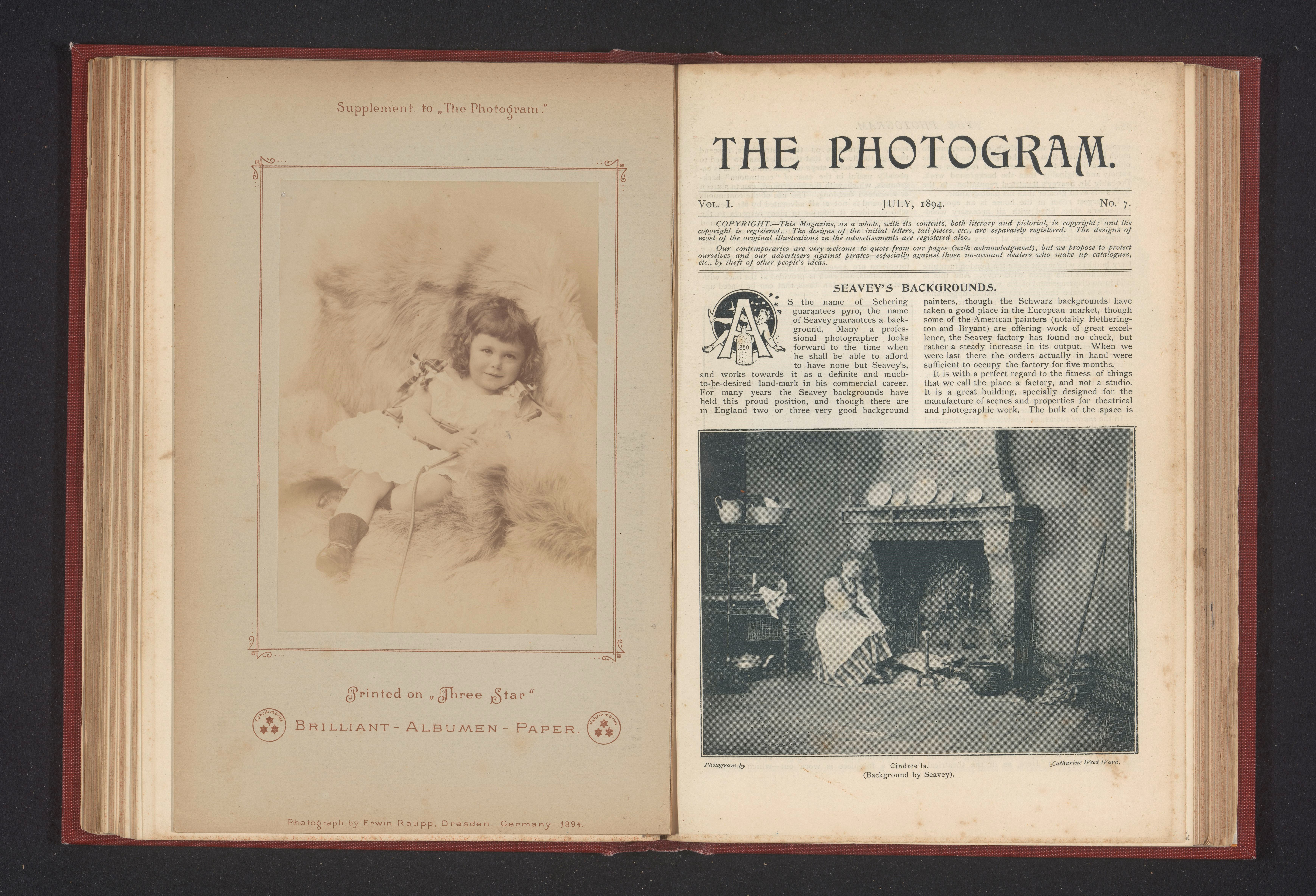 IdentificatieTitel(s): Portret van een onbekend meisjeObjecttype: foto bladzijde Objectnummer: RP-F-2001-7-1419-58Opschriften / Merken: opschrift, recto, gedrukt: ‘Printed on "Three Star"/ Brilliant-Albumen-Paper’VervaardigingVervaardiger: fotograaf: Erwin Raupp (vermeld op object)Plaats vervaardiging: DresdenDatering: 1889 - 1894Materiaal: papier Techniek: autotypieAfmetingen: foto: h 138 mm × b 97 mmToelichtingFoto tegenover pagina 153.OnderwerpWat: historical persons - BB - womangirl (child between toddler and youth)Verwerving en rechtenCredit line: Aankoop met steun van de Mondriaan Stichting, het Prins Bernhard Cultuurfonds, het VSBfonds, het Paul Huf Fonds/Rijksmuseum Fonds en het Egbert KunstfondsVerwerving: aankoop 2001Copyright: Publiek domein